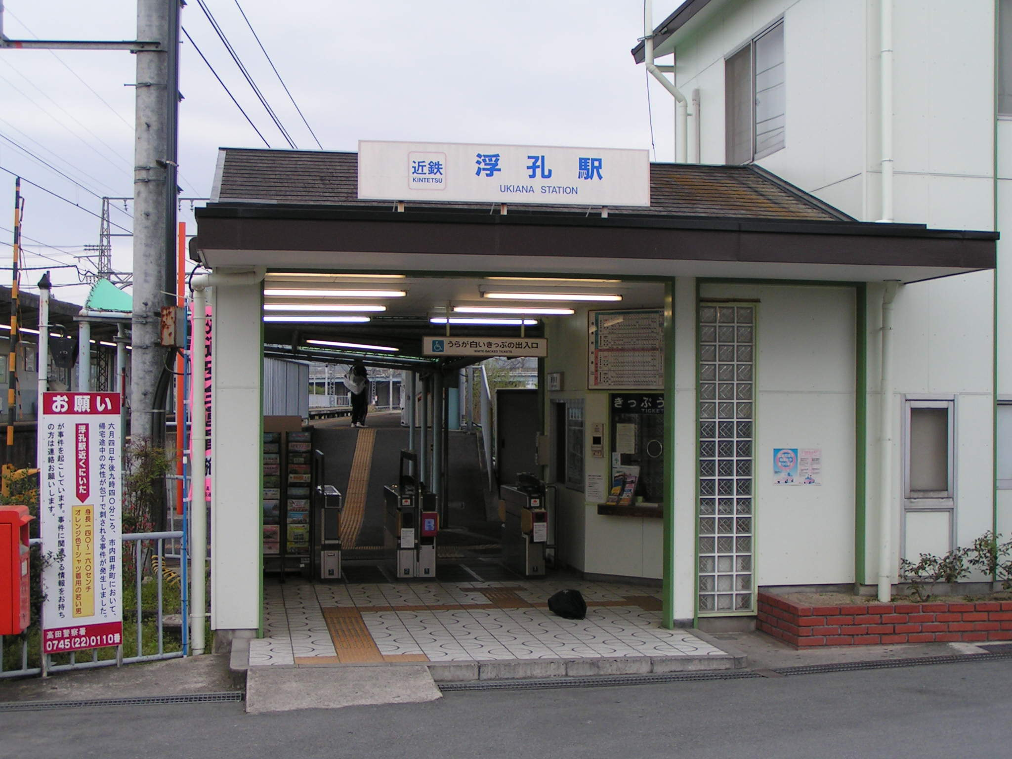 浮孔駅の駅舎